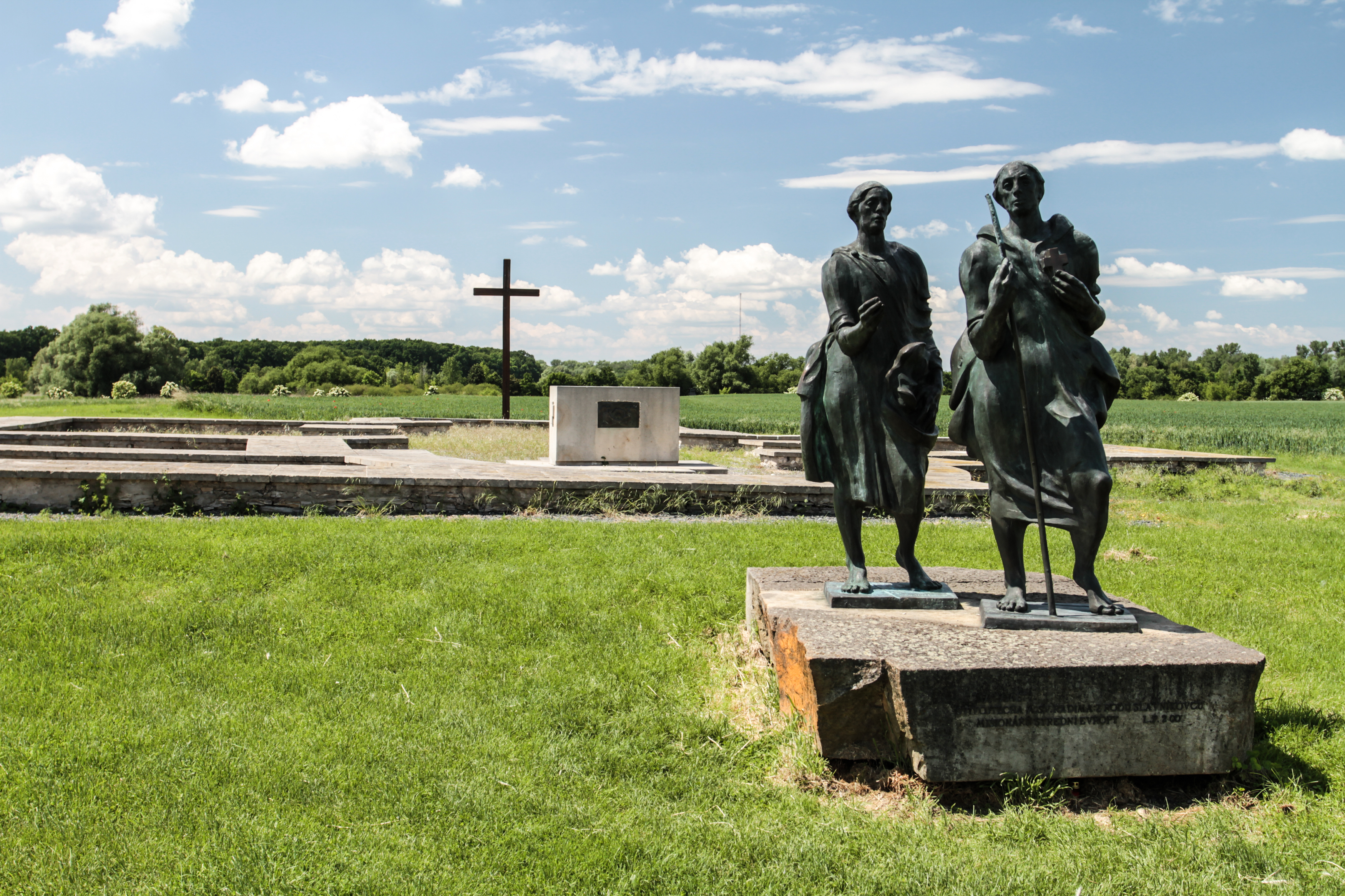 Slavníkovská Libice, Libice nad Cidlinou.